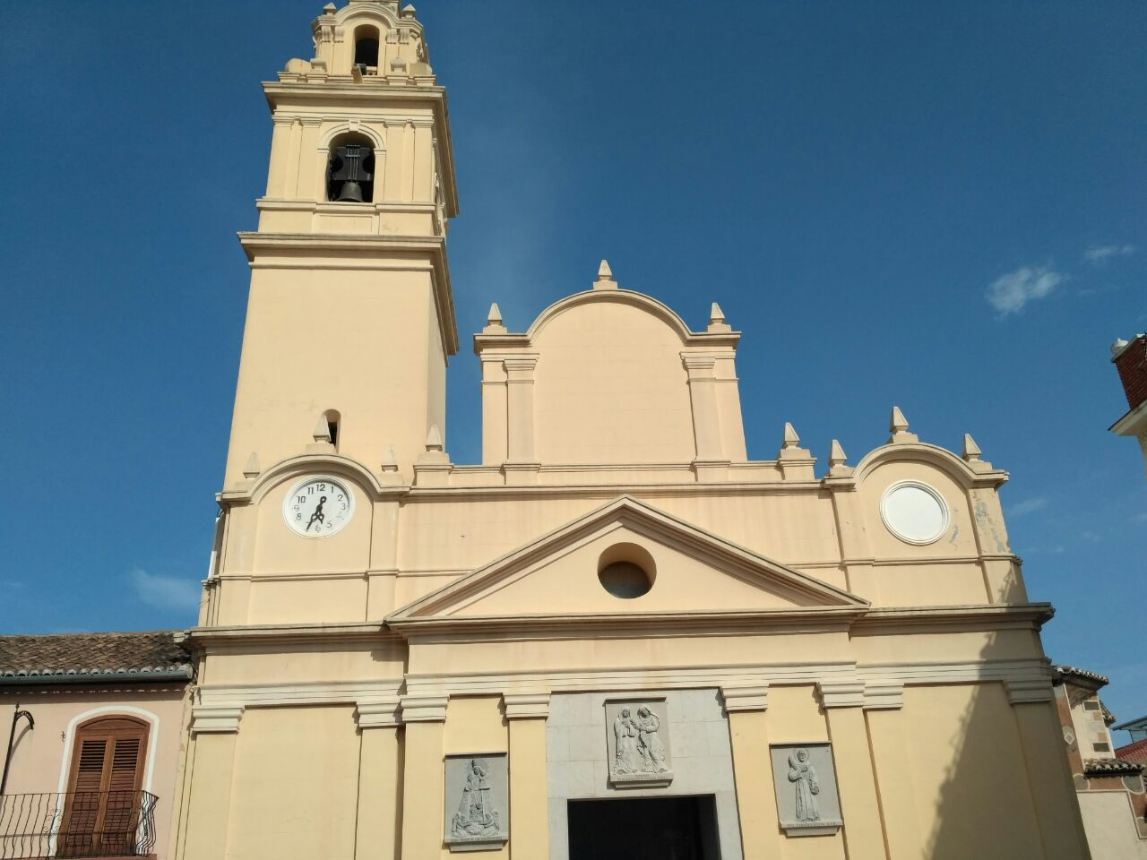 Real de Gandía, Iglesia parroquial de la Visitación de Santa María